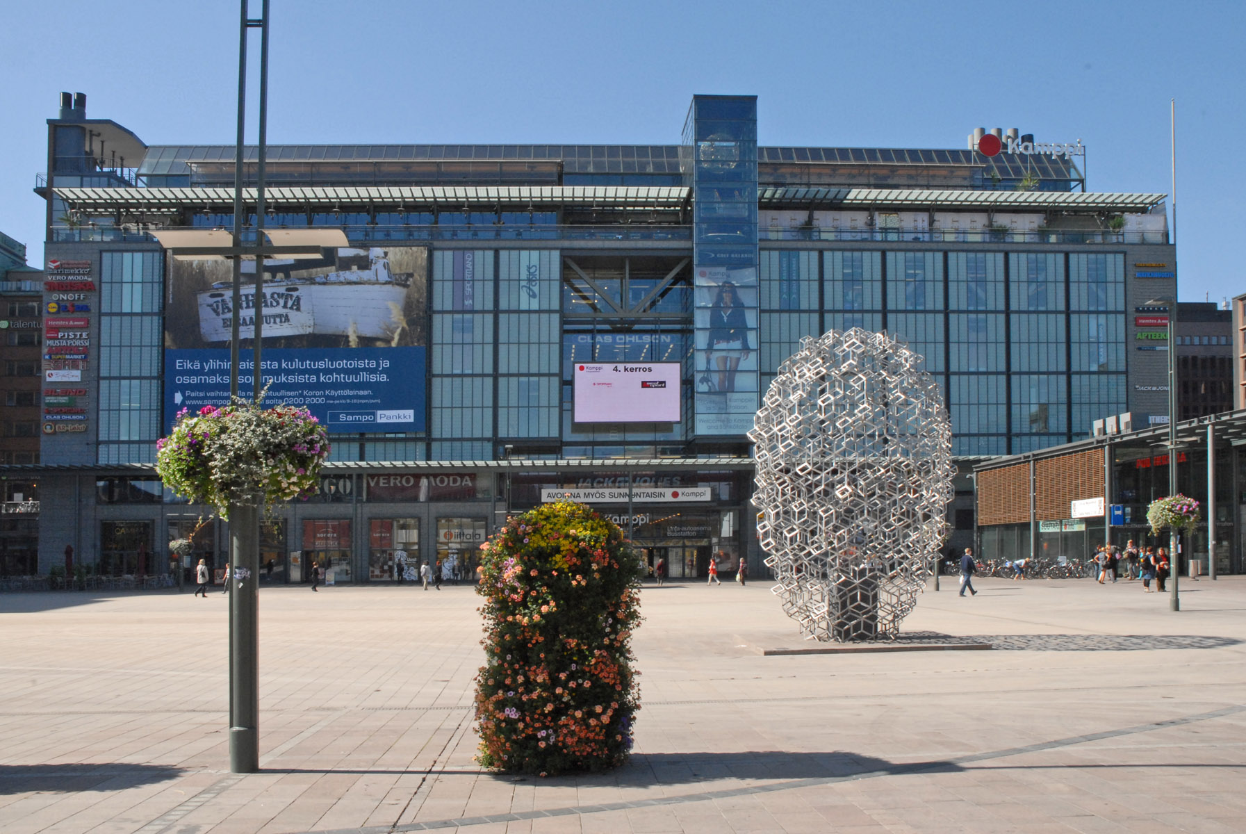 Le Kamppi est un vaste centre commercial qui incorpore une gare routière, il comprend de nombreux restaurants et magasins de mode. Il constitue le nouveau centre urbain d'Helsinki.